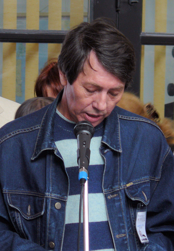 Prozatorul român Constantin Stan, la evenimentul "Scriitori pe calea regală", Suceava, 2008